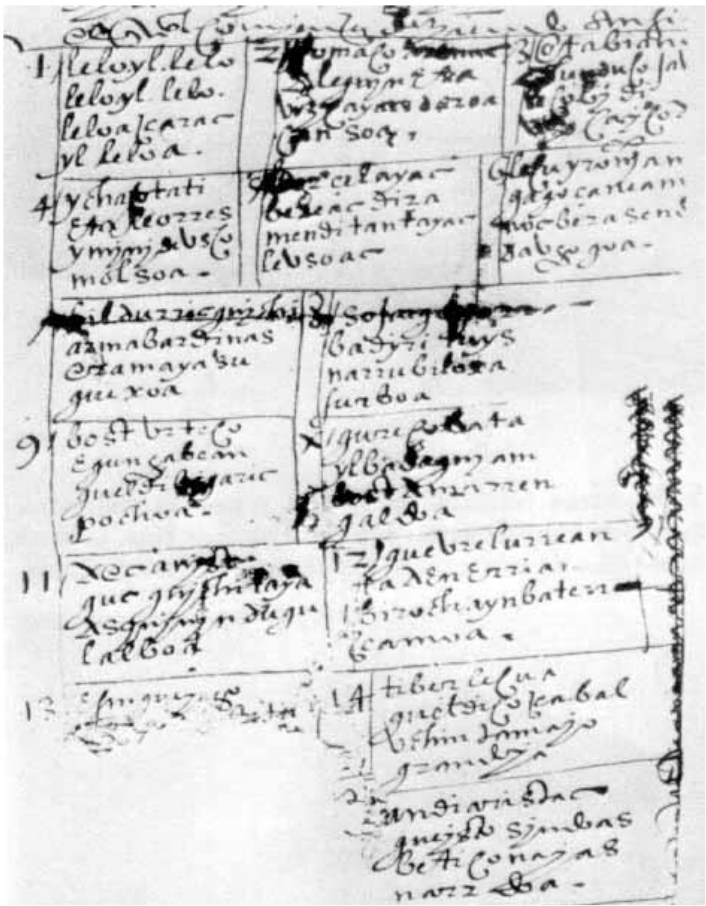 Salinasko kondearen kantua (Lelori lelo...), Ibarguen -Cachopin kronikaren orri batean